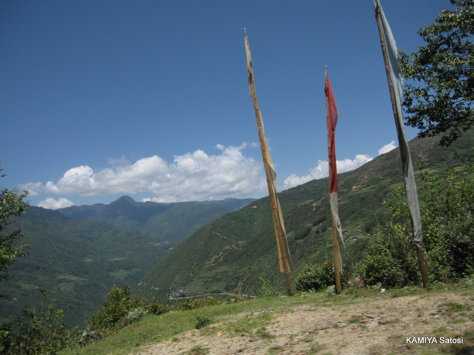 Trongsa, Bhutan